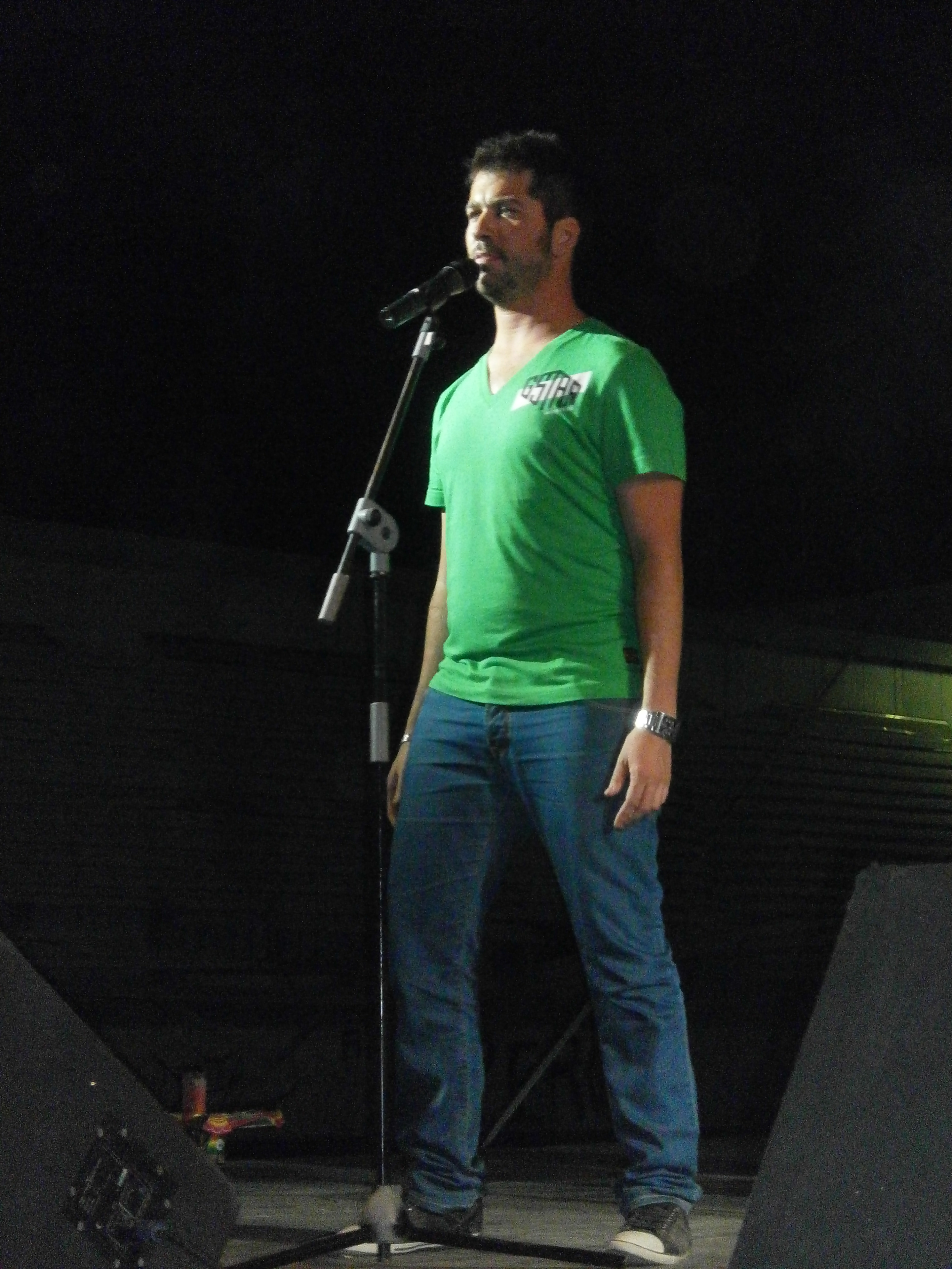 Javi Soleil durante el concierto de Orgullo del Sur 2011